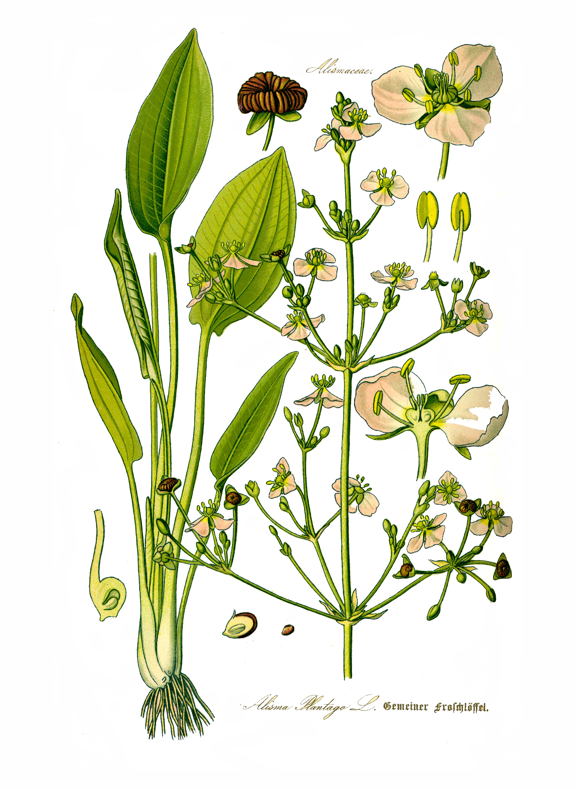 Alisma plantago aquatica